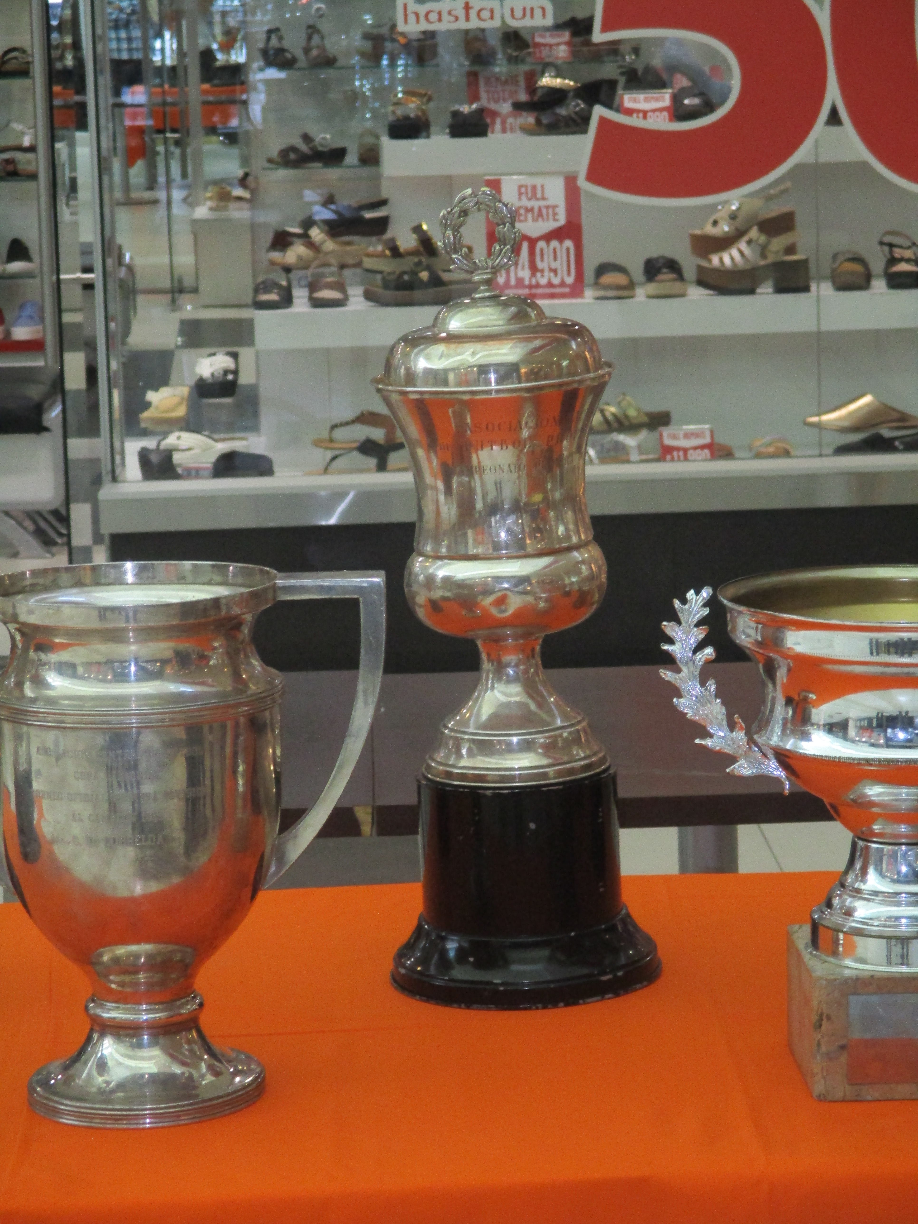 Trofeo de Cobreloa obtenido en el año 1988